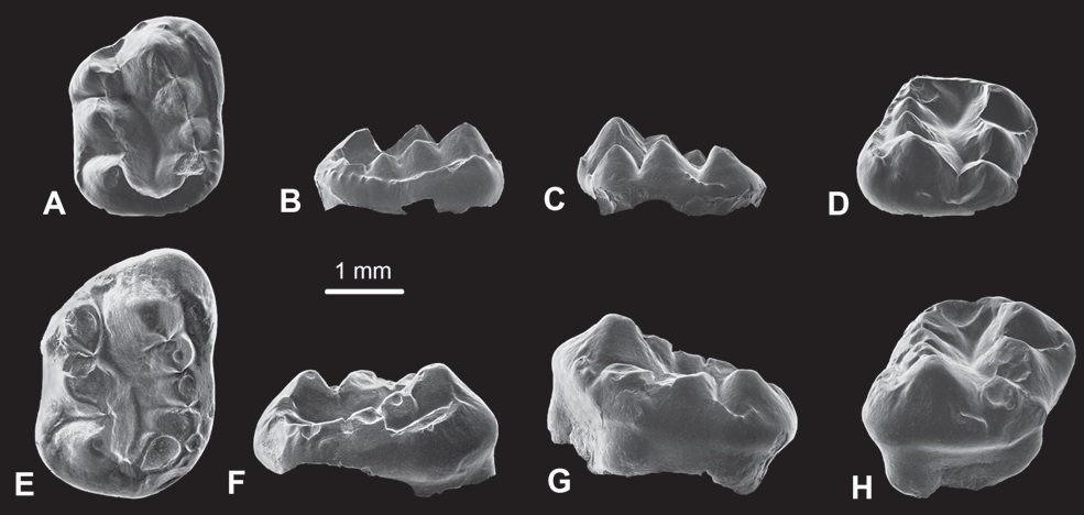 Upper left molariforms of Thomasia cf. moorei (Owen, 1871). M45421. A –– Occlusal view, distal toward top, lingual to right; B –– lingual view, distal to right; C –– buccal view, distal to left; D –– oblique view, distal in foreground, buccal to right. M45422; E –– occlusal view, distal toward top, lingual to right; F –– lingual view, distal to right; G –– buccal view, distal to left; H –– oblique view, distal in foreground, buccal to right.